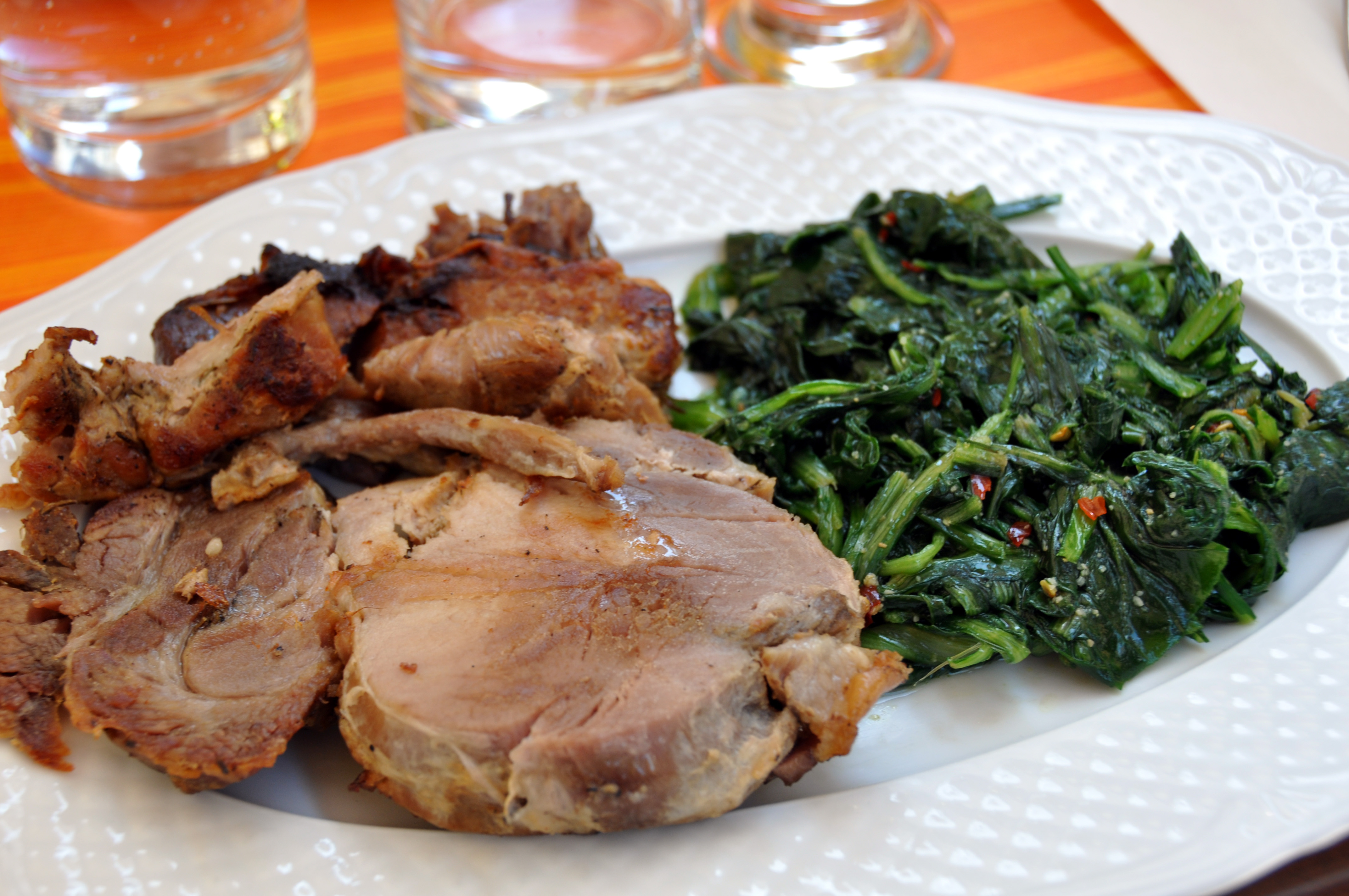 Porchetta med spinat